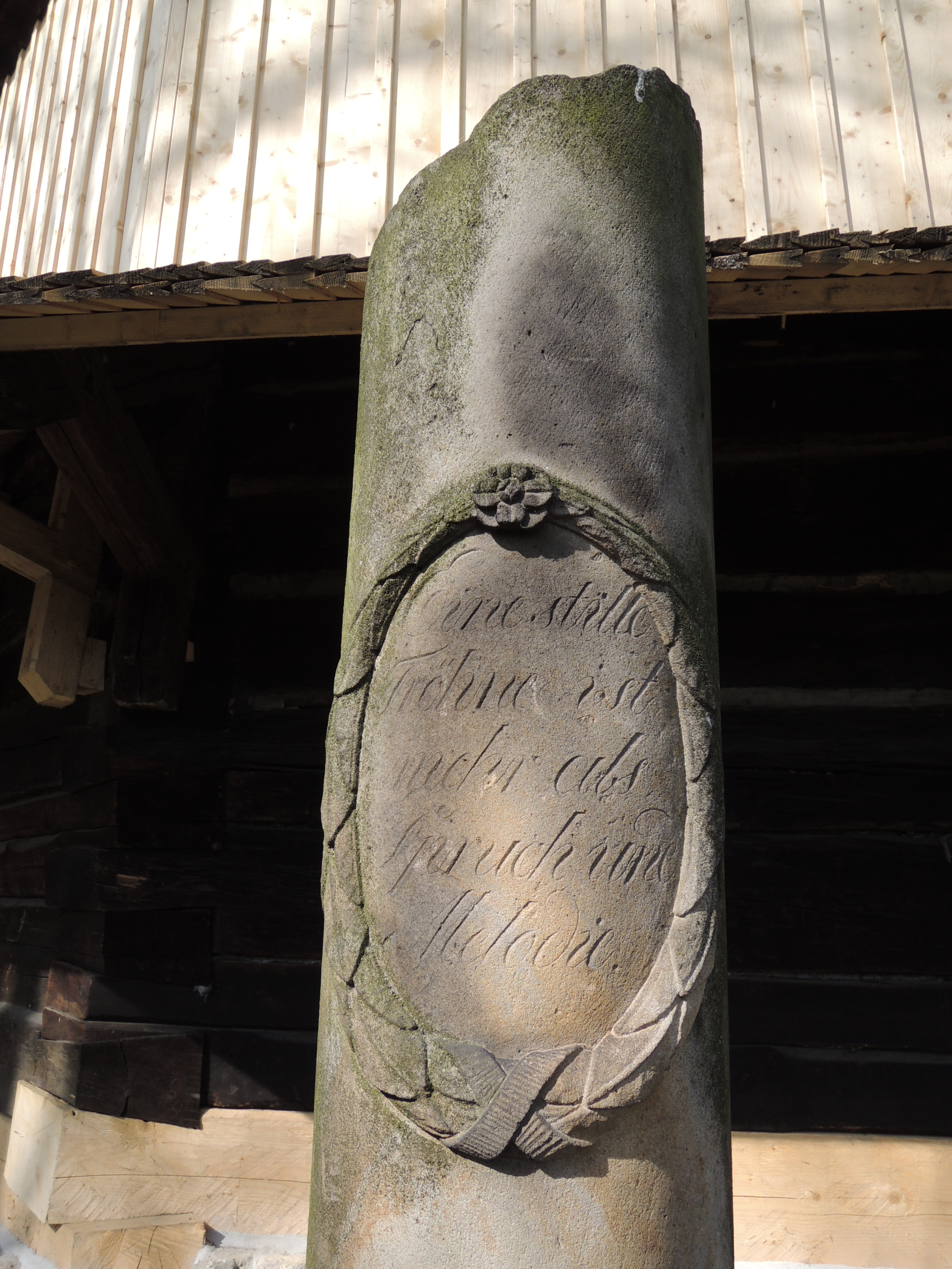 Stary cmentarz przy kościele św. Marii Magdaleny w Bełku - cenotaf ku czci Johanna Friedricha Holtze